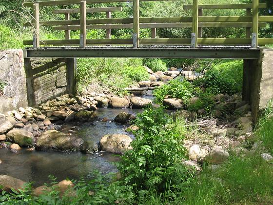 Schlatbach, Prignitz-Brandenburg; Sohlgleite („Fischtreppe“) in der Nähe der Brücke Gramzow-Mühle (Brücke nicht auf dem Bild)